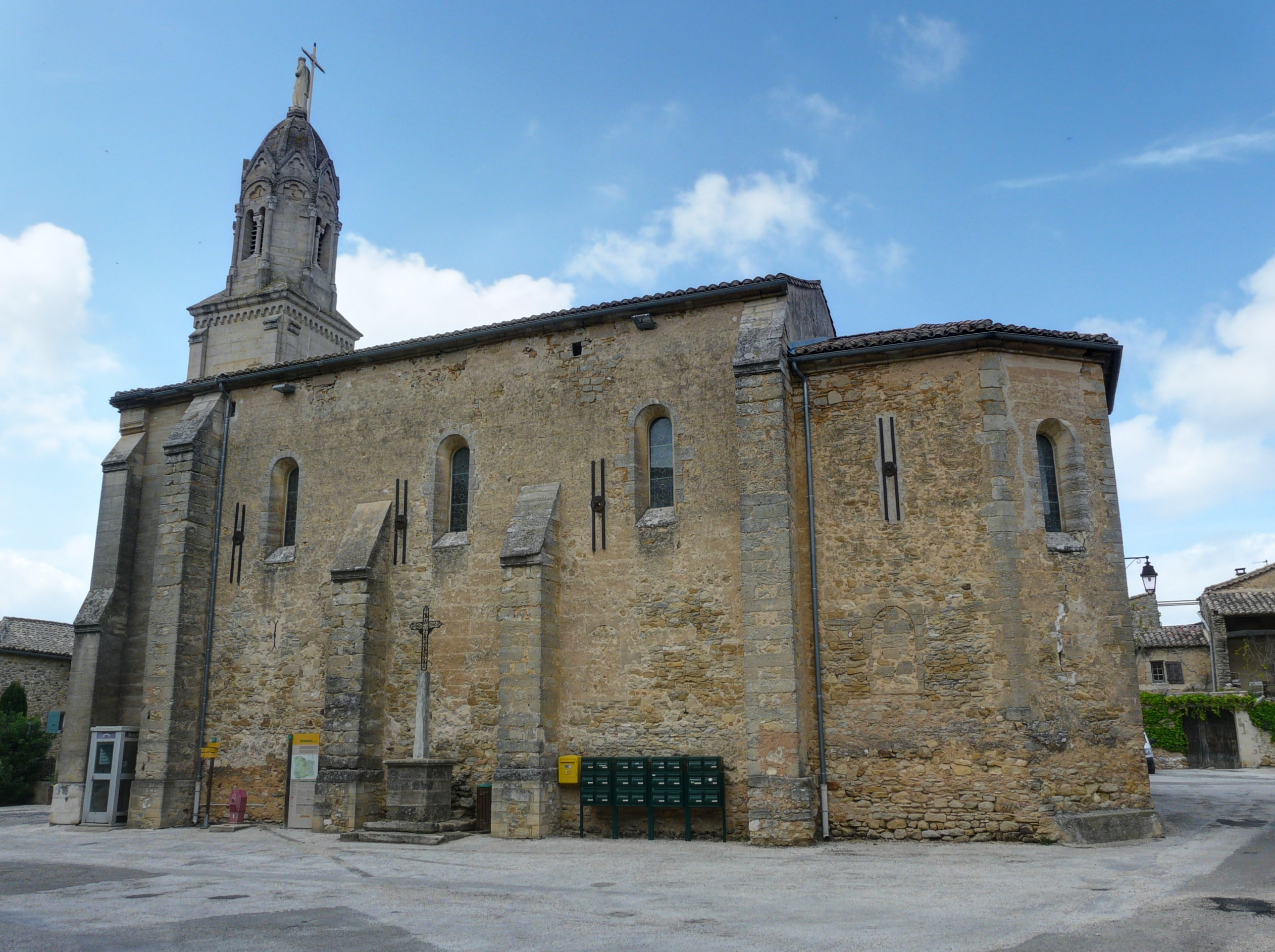 Eglise de Fontarèches